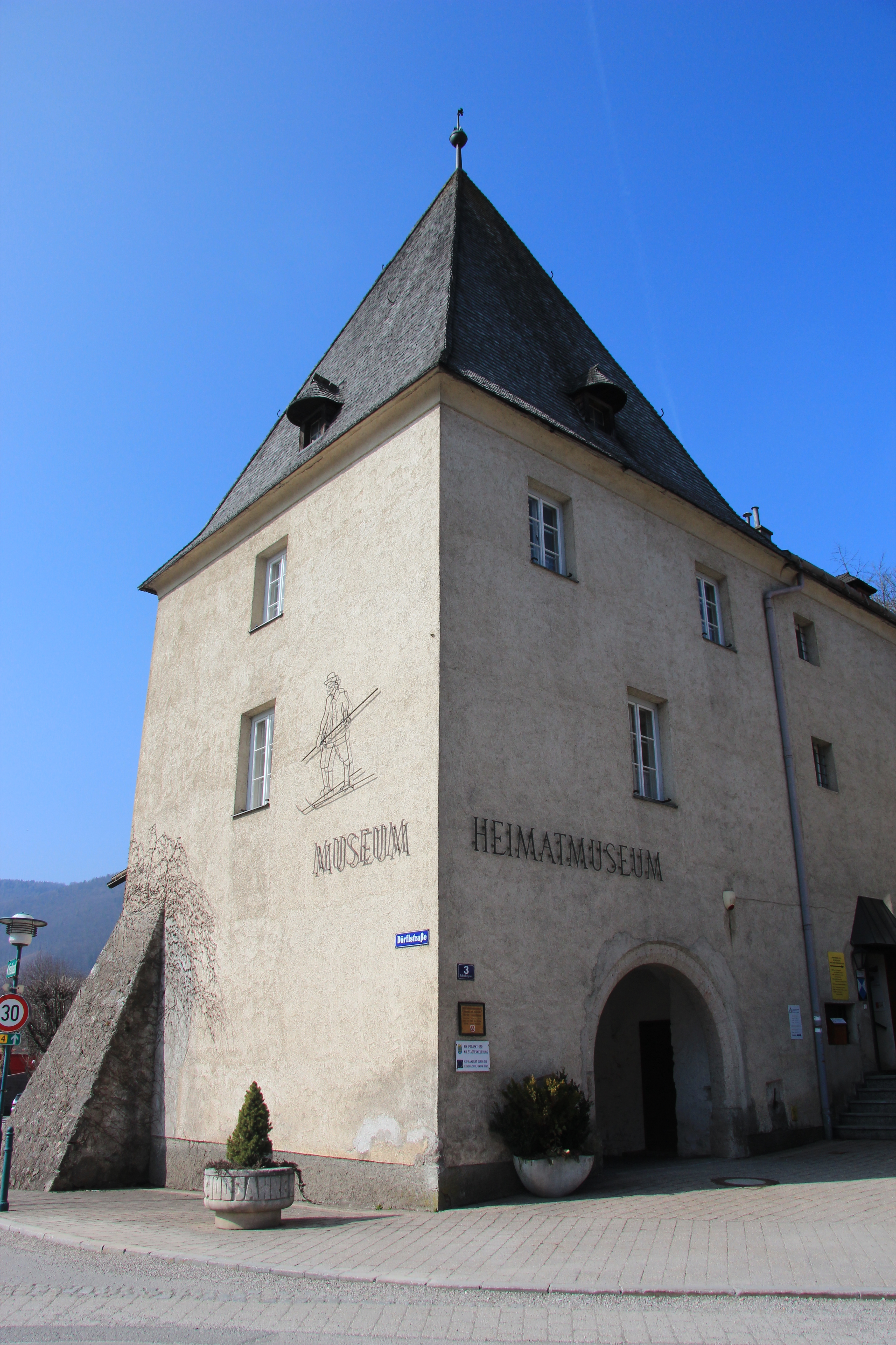 Dienerturm in Lilienfeld, Niederösterreich